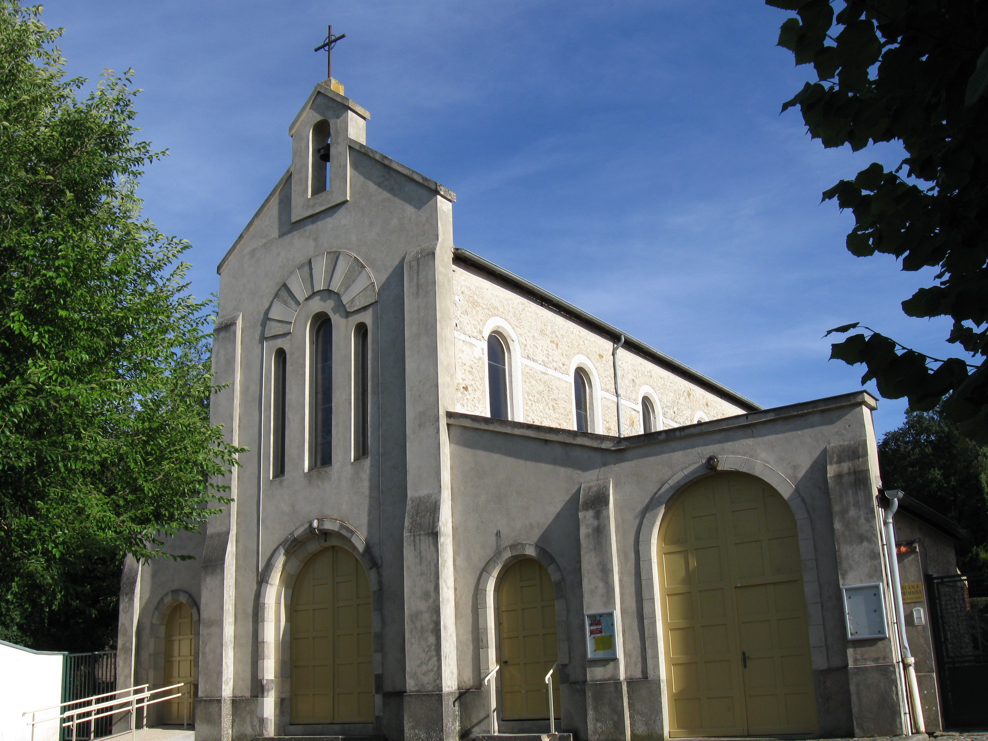 Chapelle Notre-Dame-de-la-Nativité. (Janville-sur-Juine, Essonne, région Île-de-France).